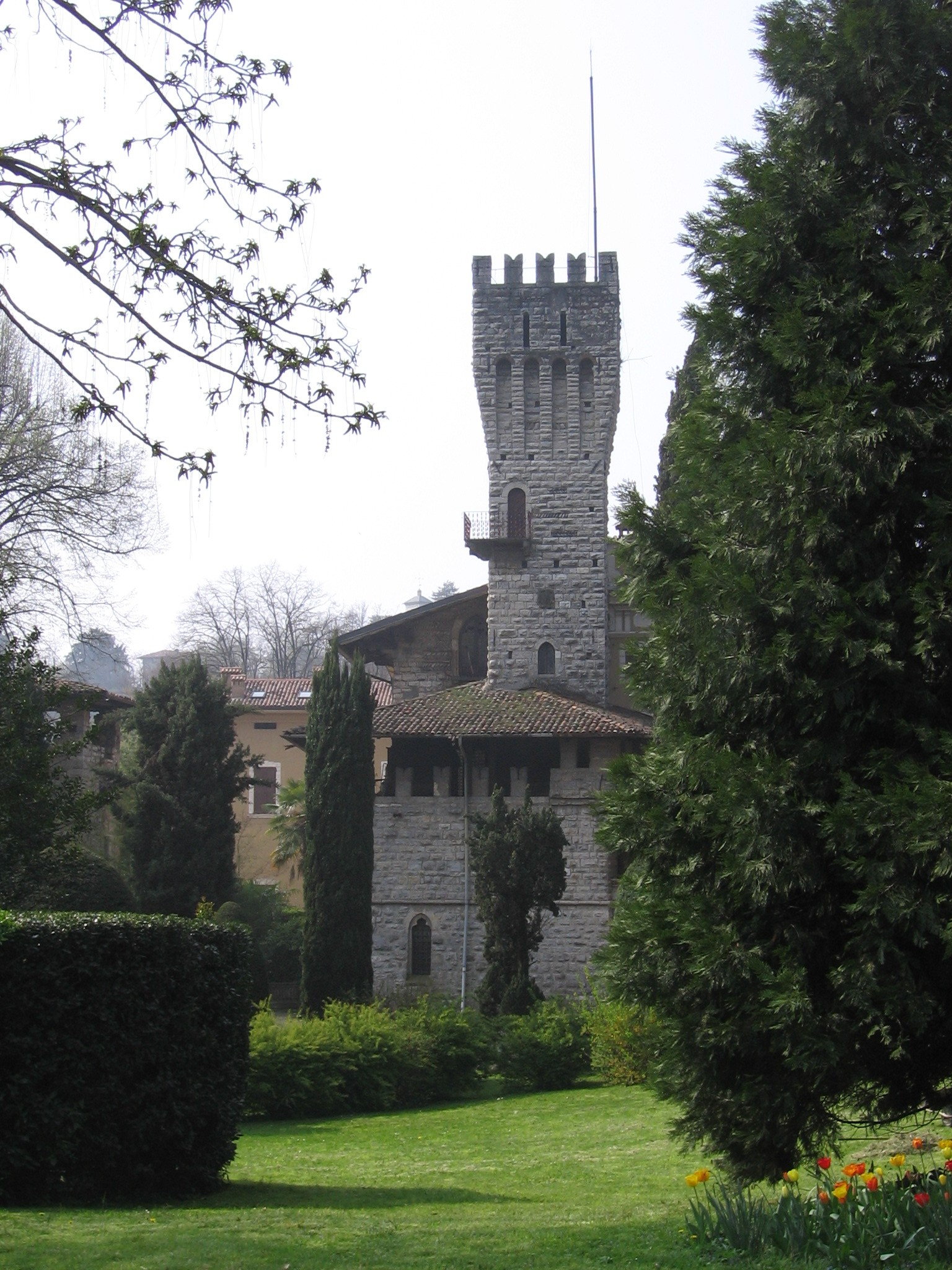 Trescore Balneario, Bergamo, Italia